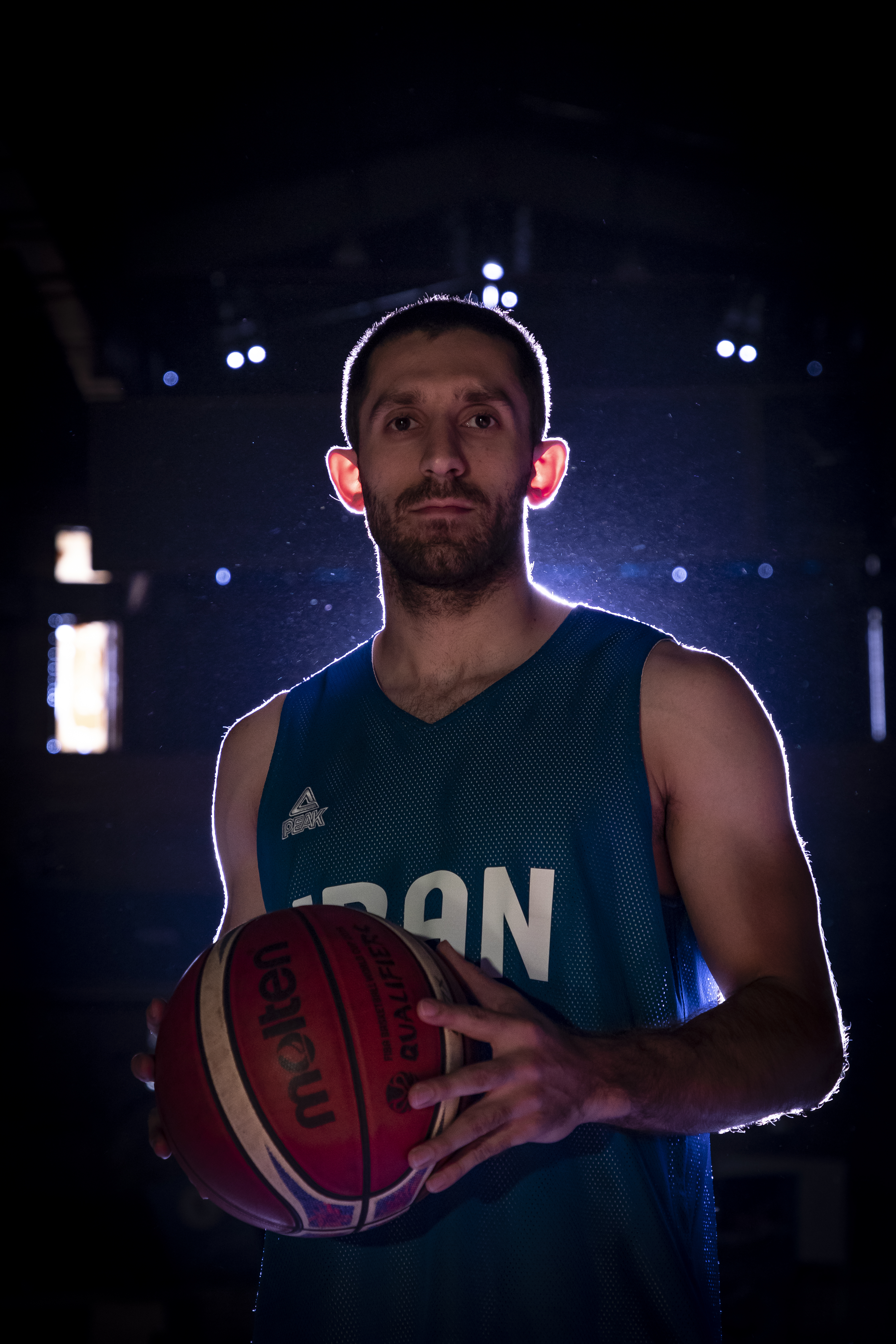 Sajjad Mashayekhi